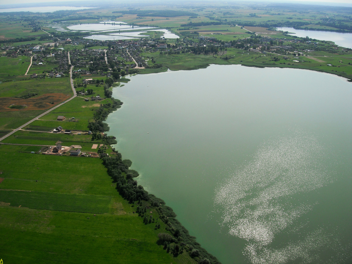 Simnas.Vaizdas iš viršaus